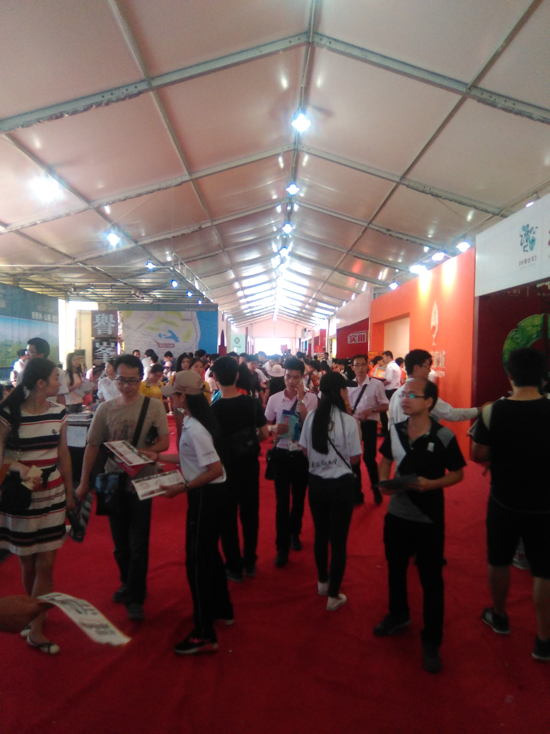 我在珠海拍的